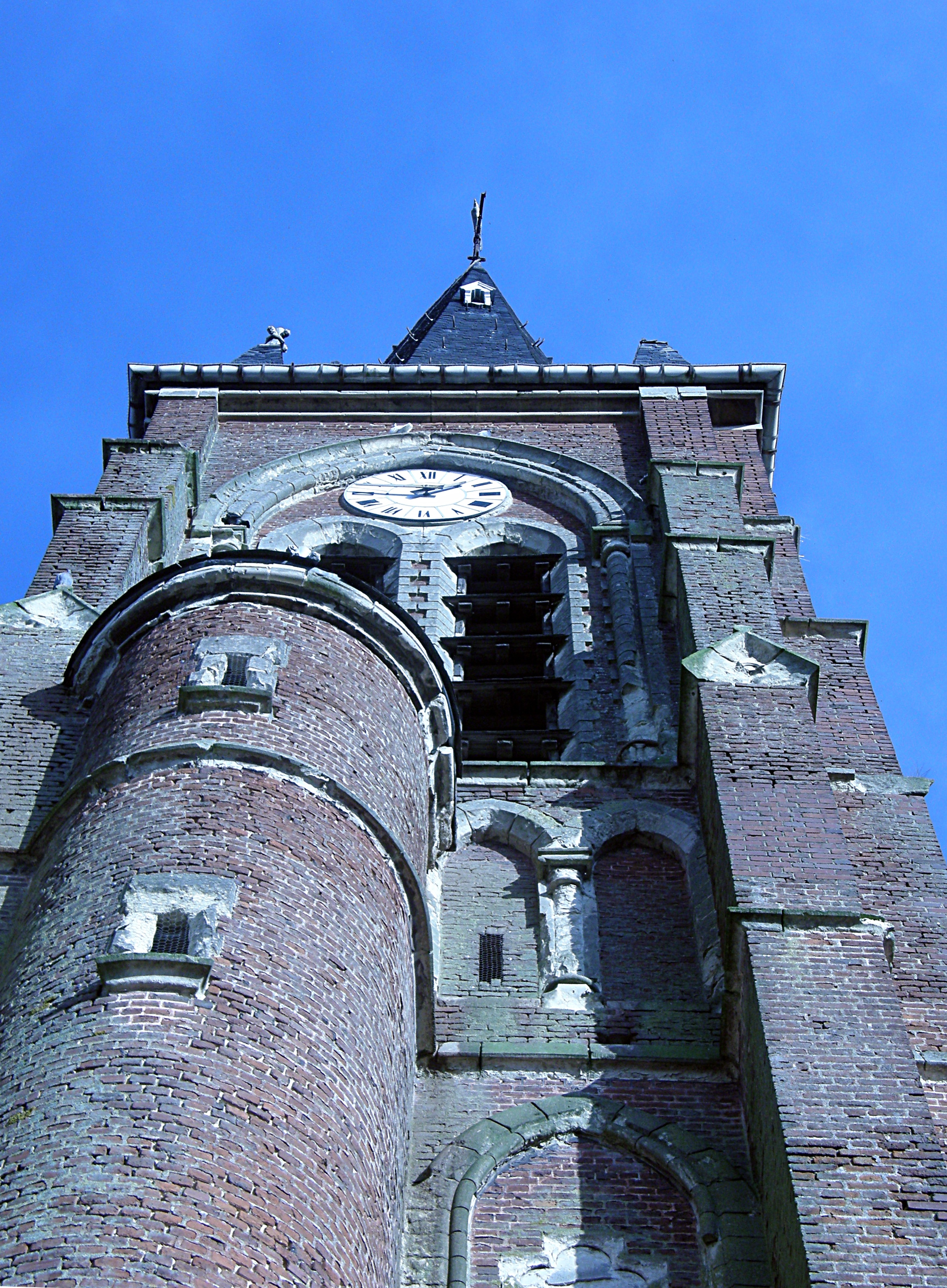 Écourt-Saint-Quentin (Pas-de-Calais, France). Le clocher de l'église. .